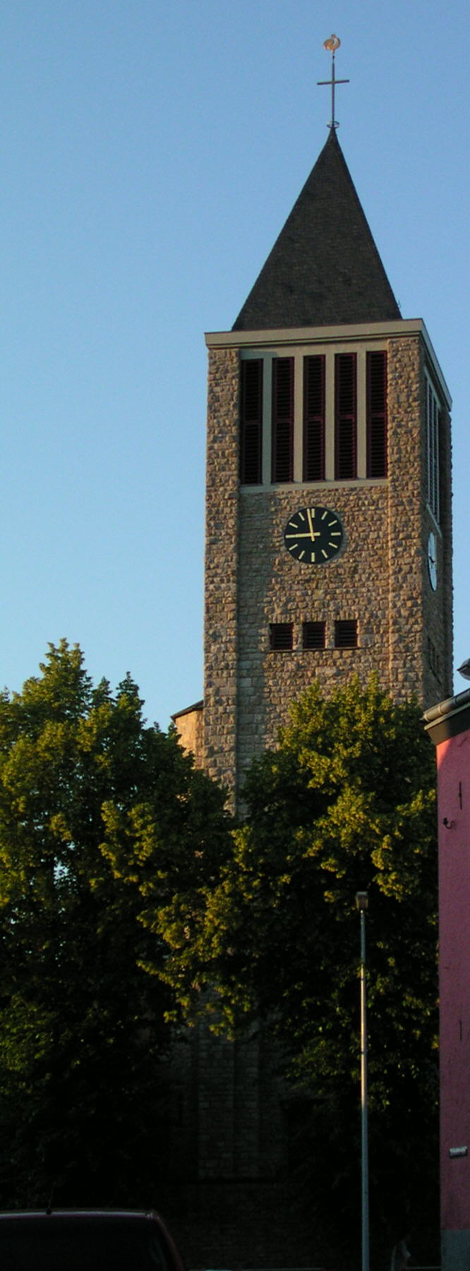 Stolberg Mausbach, rk. Pfarrkirche “Sankt Markus” (wird bei Gelegenheit durch besseres Foto ersetzt)